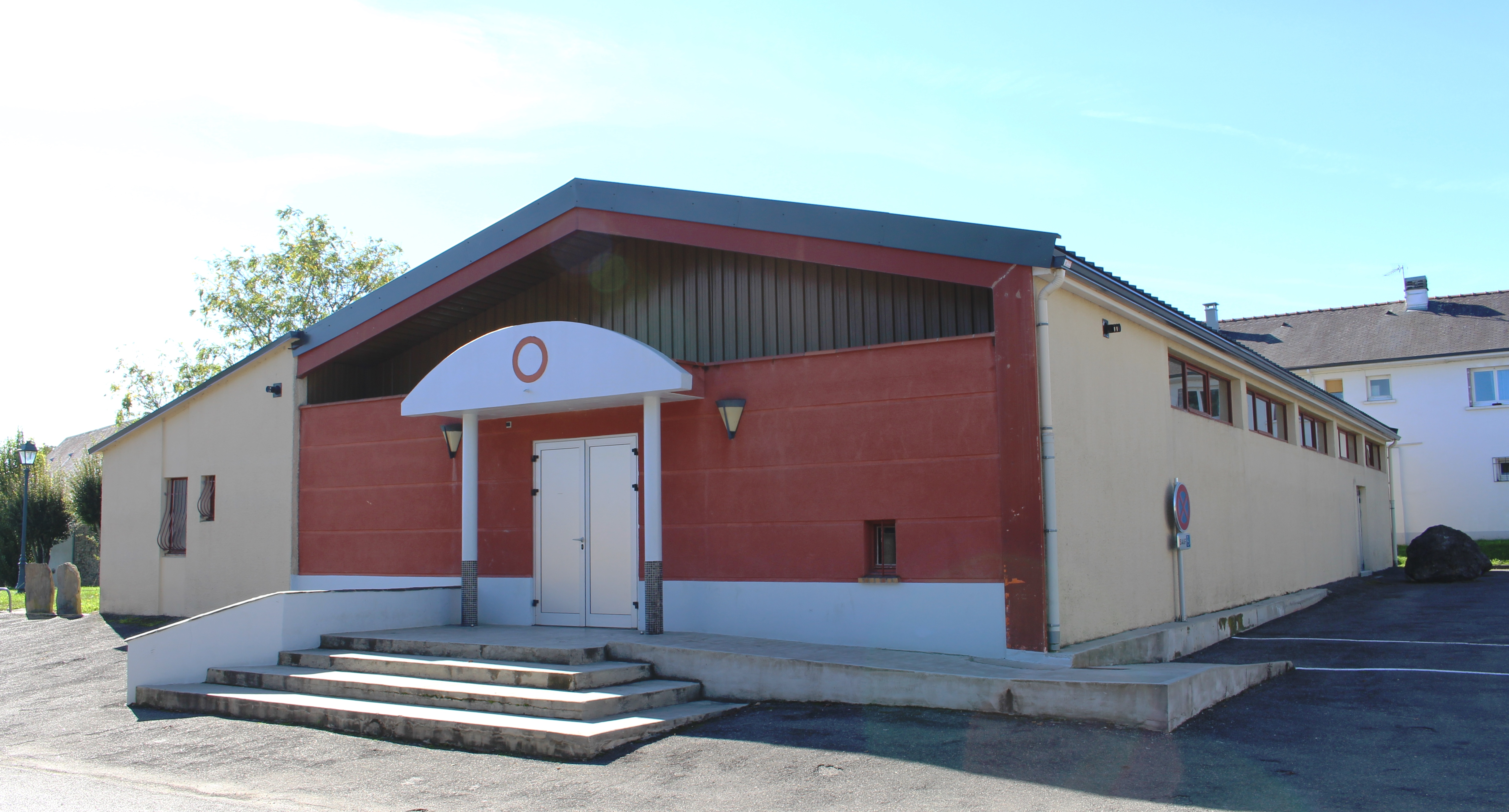 Salle des fêtes de Lanne (Hautes-Pyrénées)